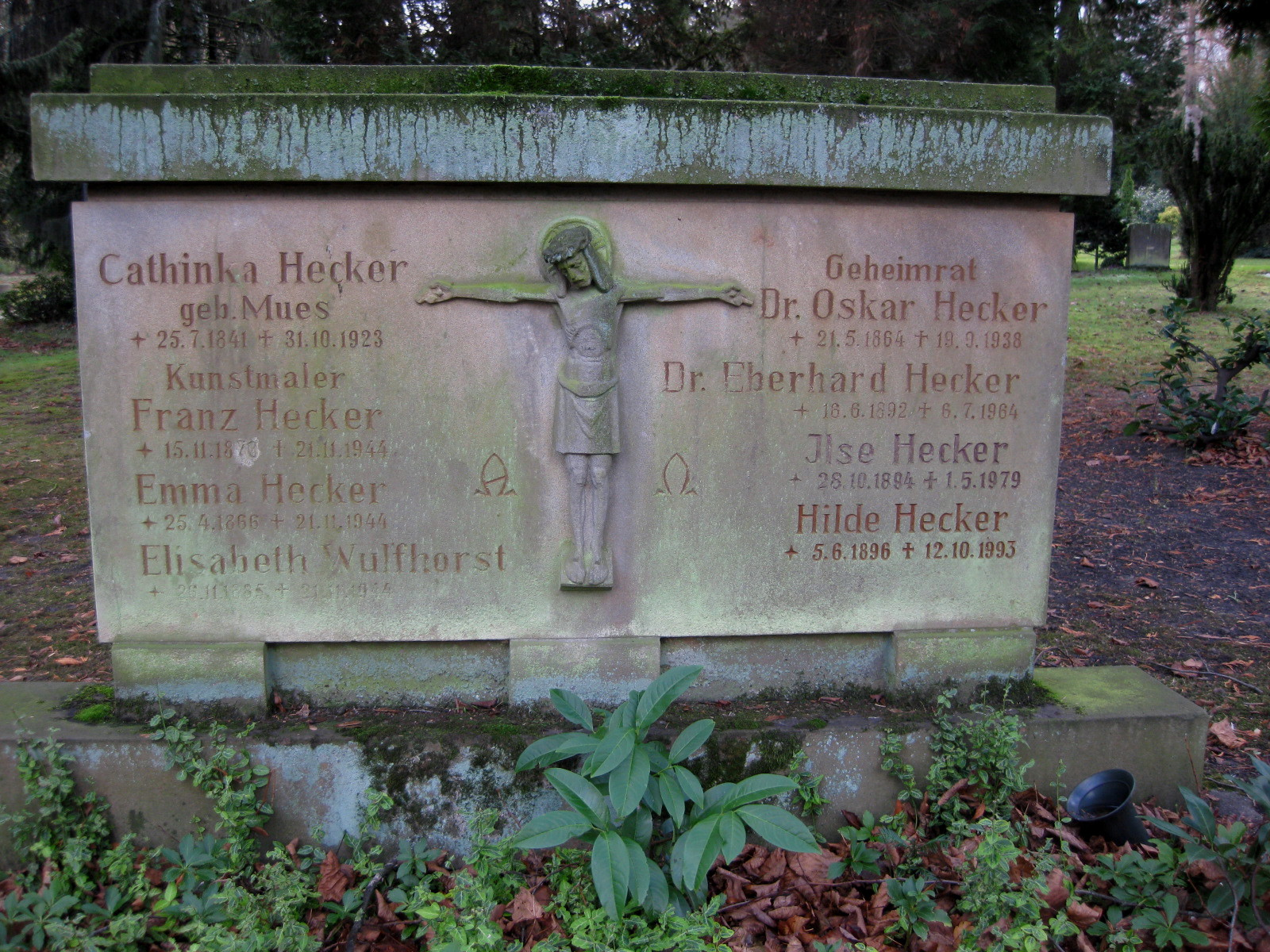 Grabmal der Familie und des Malers Franz Hecker auf dem Johannisfriedhof in Osnabrück